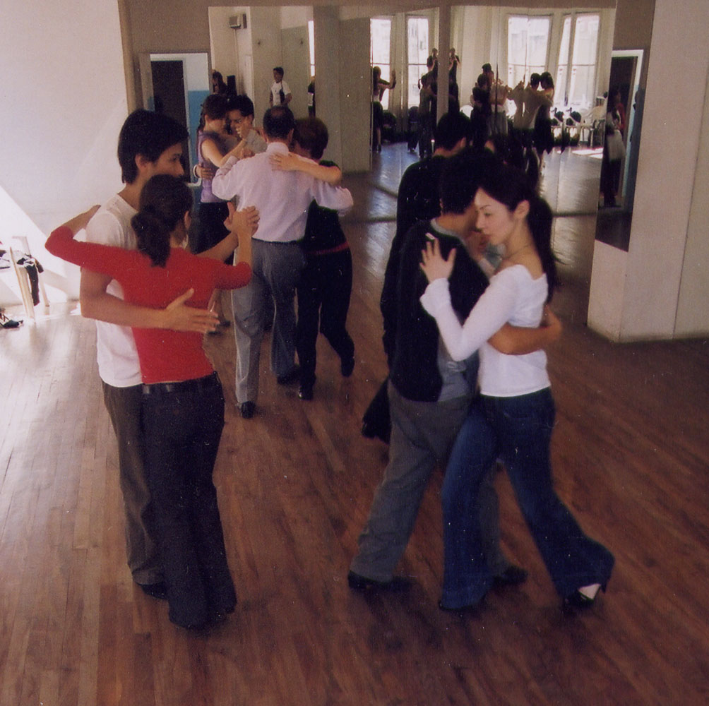 Argentinsk tango i Buenos Aires.